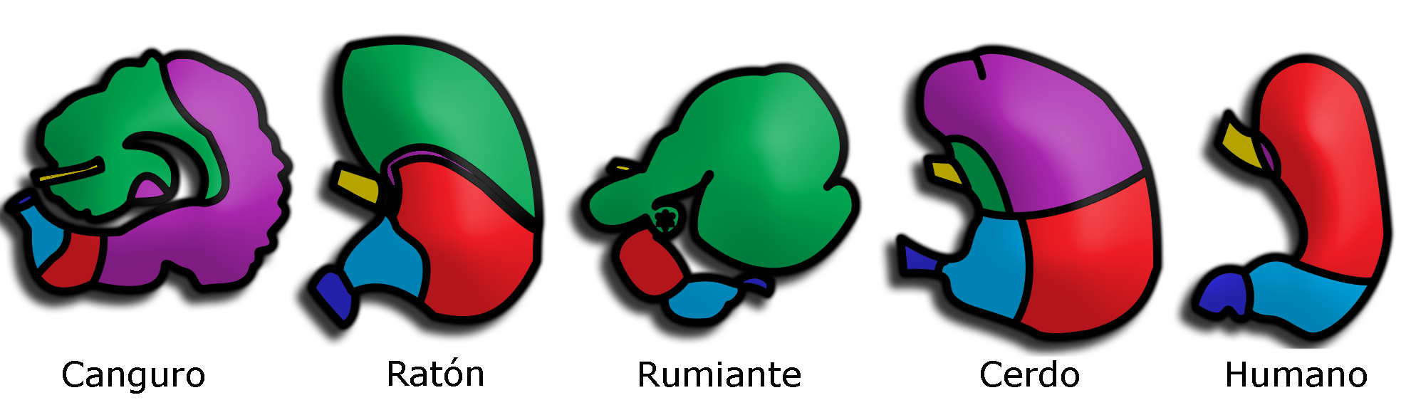 Esquema en el que se compara el estómago de diferentes mamíferos. Amarillo: esófago. Verde: epitelio aglandular. Púrpura: Glandulas del cardias. Rojo: Glandulas gástricas. Azul: glandulas del píloro. Azul oscuro: duodeno.